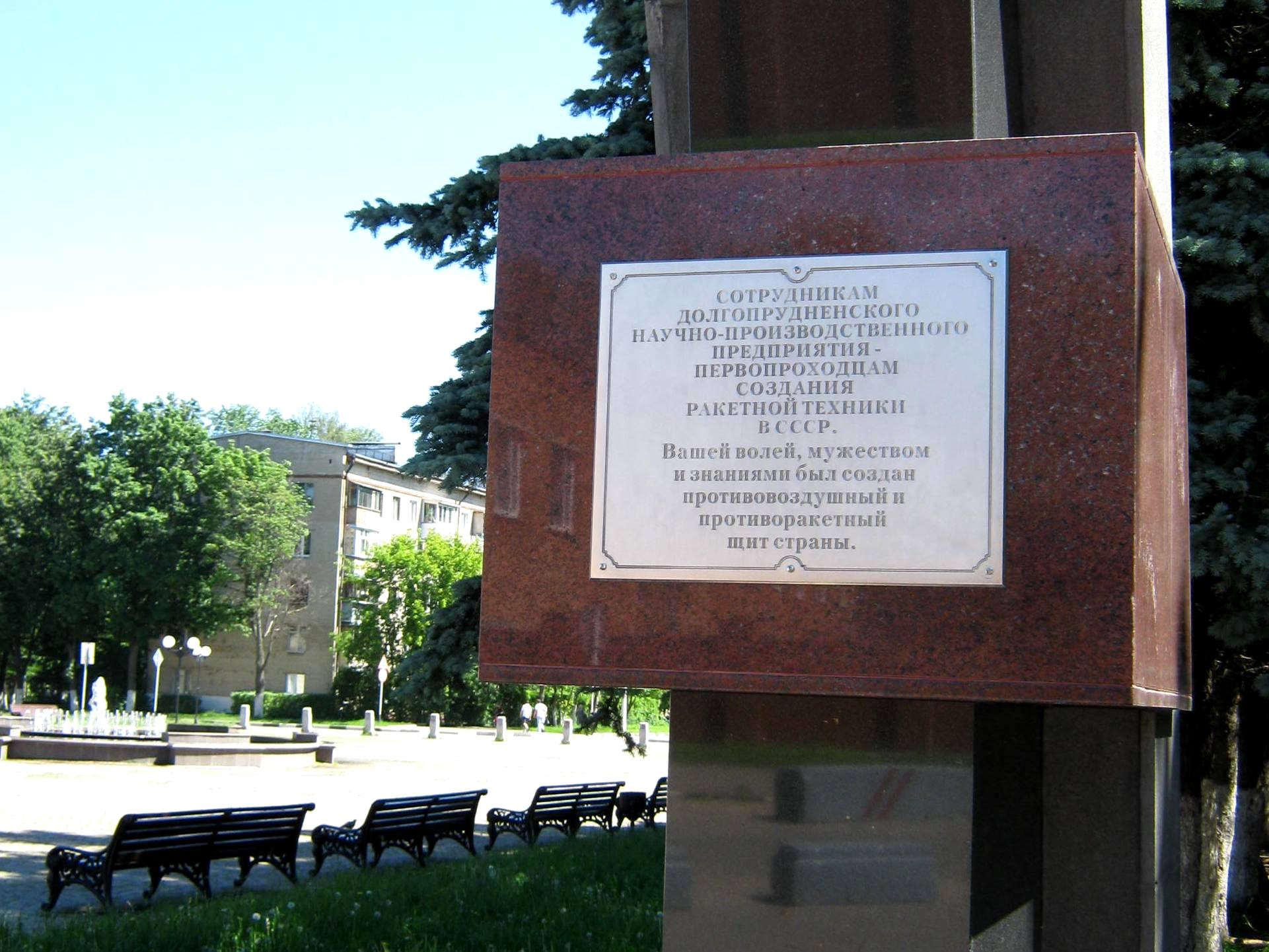 Мемориальная доска сотрудникам ДНПП